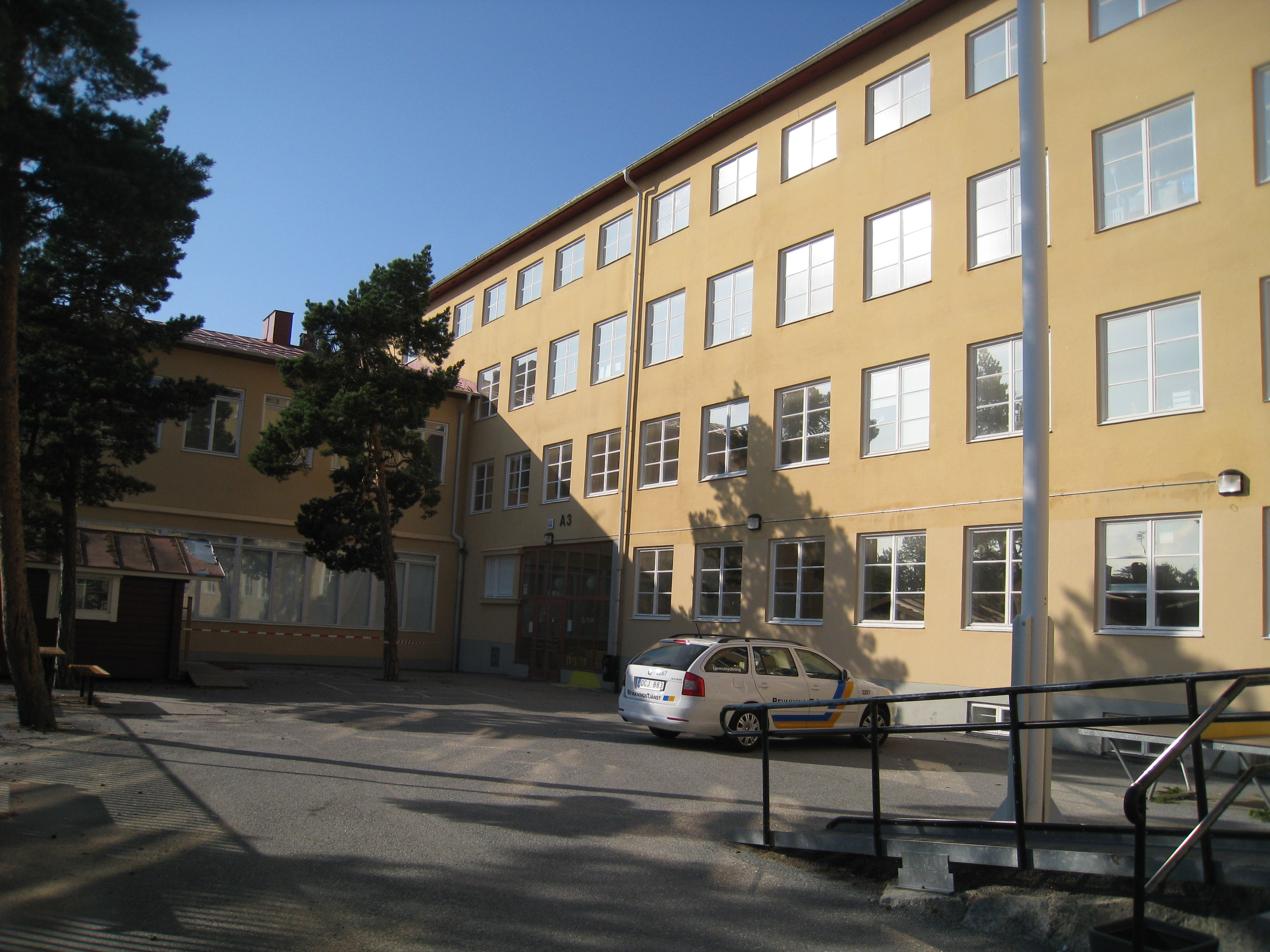 Höglandsskolan vid Höglandet, ingång A3. Höglandsskolan är byggd i funktionalistisk stil och uppförd i etapper 1931-1938 efter ritningar av arkitekten Gustaf Birch-Lindgren (1892-1969).